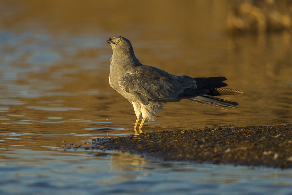 Montagu's Harrier - Castuera - Estremadura_S4E6362